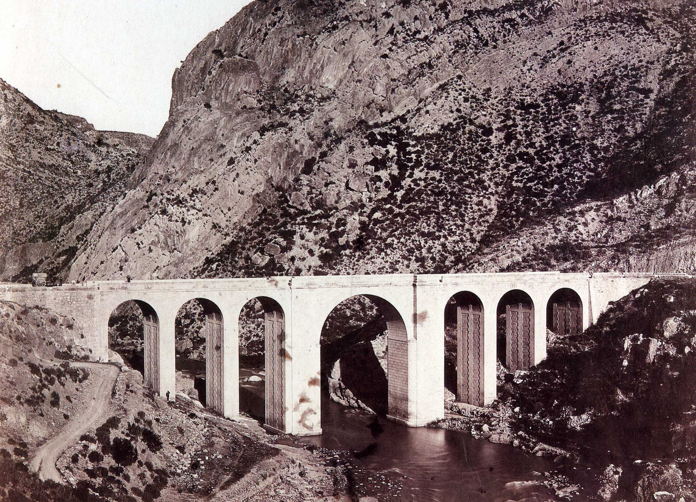 Vista del Puente sobre el río Cabriel en la carretera de Madrid a Valencia por las Cabrillas, hacia 1866. Se terminó de construir en el año 1851, bajo la dirección y proyecto del Ingeniero de Caminos Lucio del Valle. Está situado entre las provincias de Cuenca y Valencia. En su momento y debido a su tamaño se le denominó el ciempiés. En la actualidad está en desuso.